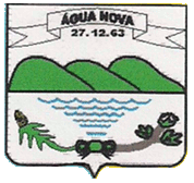 Brasão de Água Nova, estado do Rio Grande do Norte, Brasil